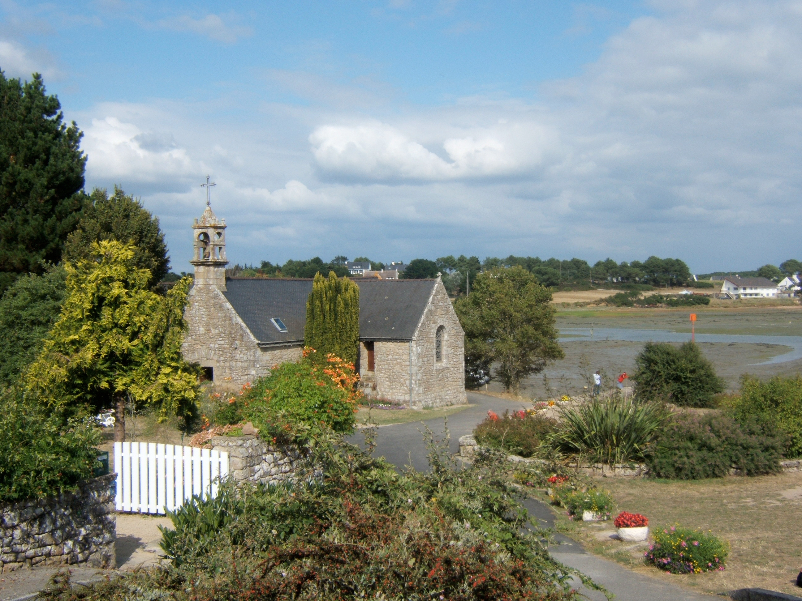 L'église Saint-Philibert de Saint-Philibert, non loin du Golfe du Morbihan.